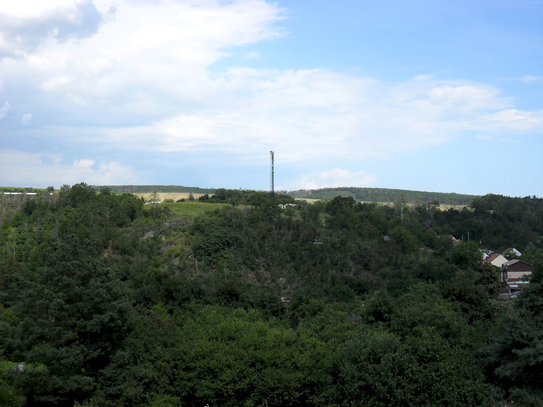 V Zaražených, pohled od jihozápadu